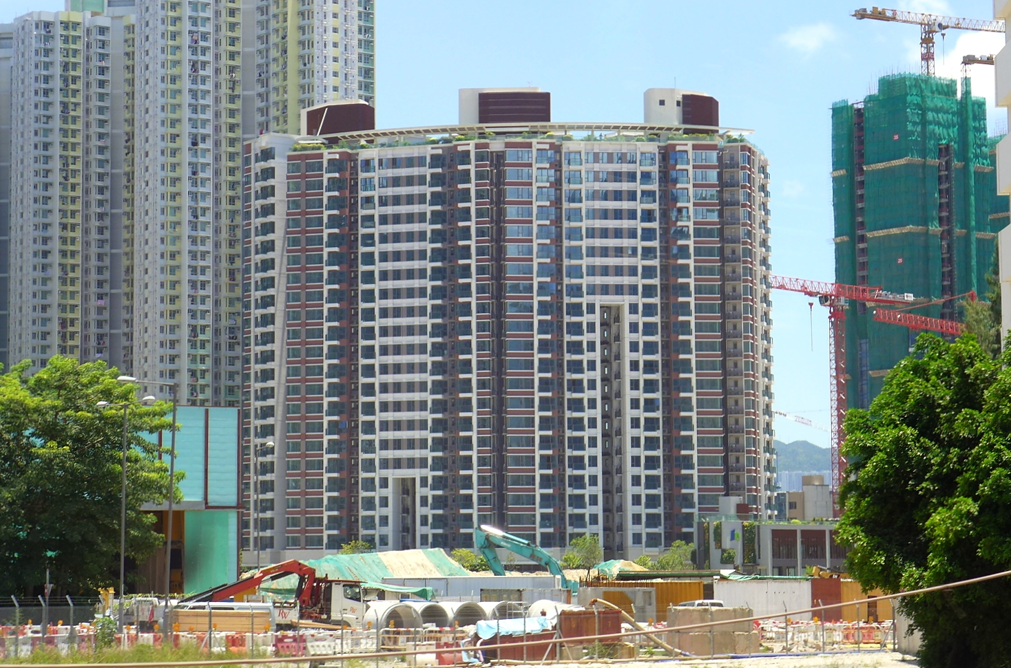 De Novo Site view